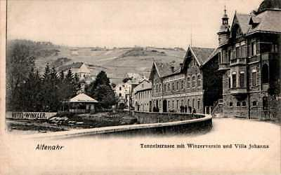 Postkarte mit der Villa Johanna in Altenahr